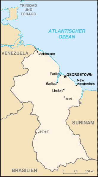 Karte von Guayana